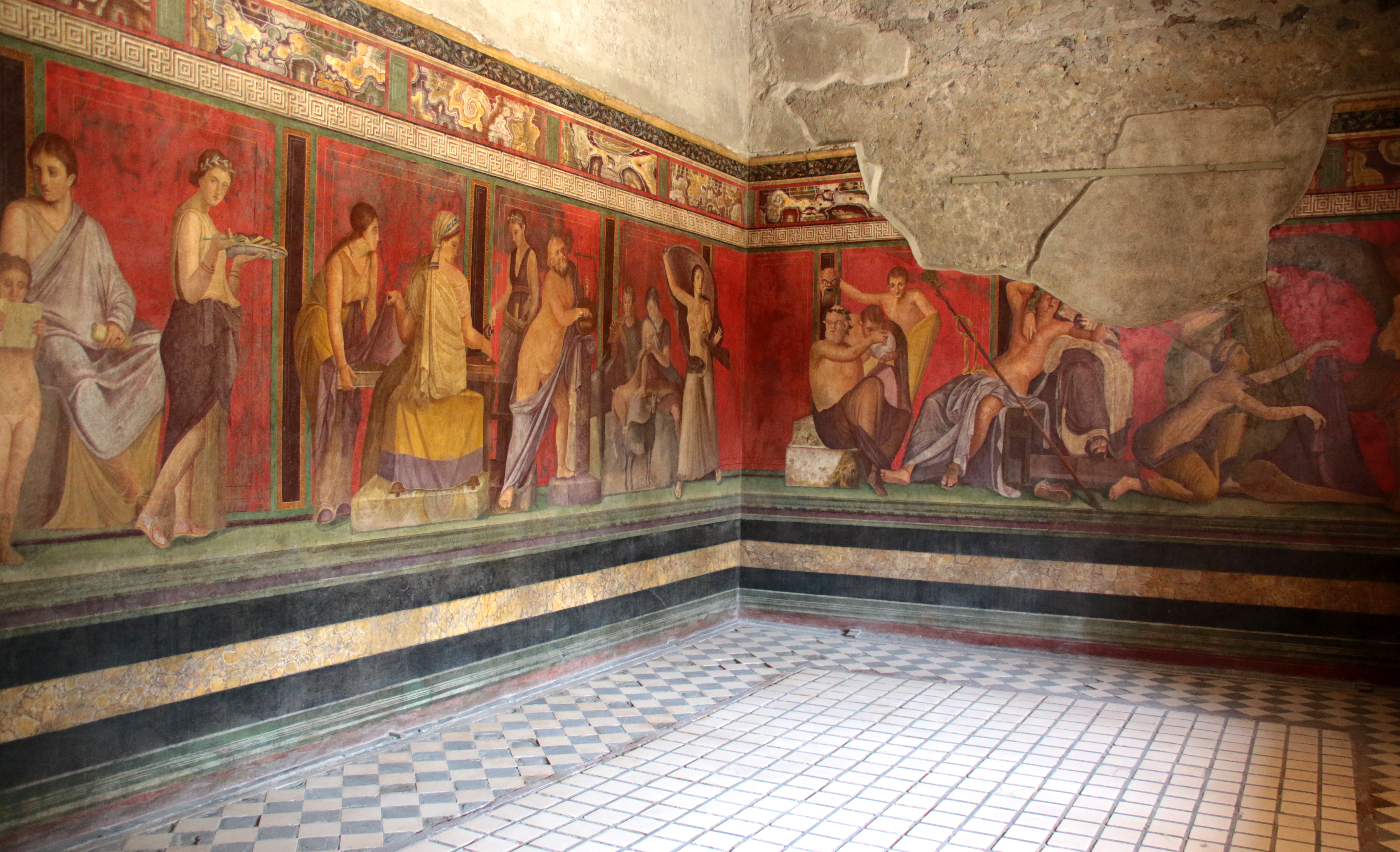 Villa dei Misteri - Pompei